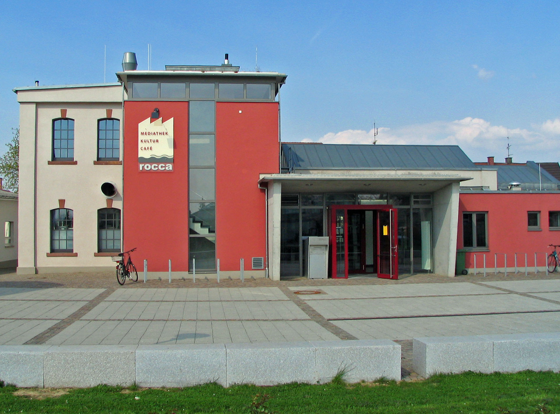 Denzlinger Rocca (Mediathek Kultur Café) nördliche Ansicht